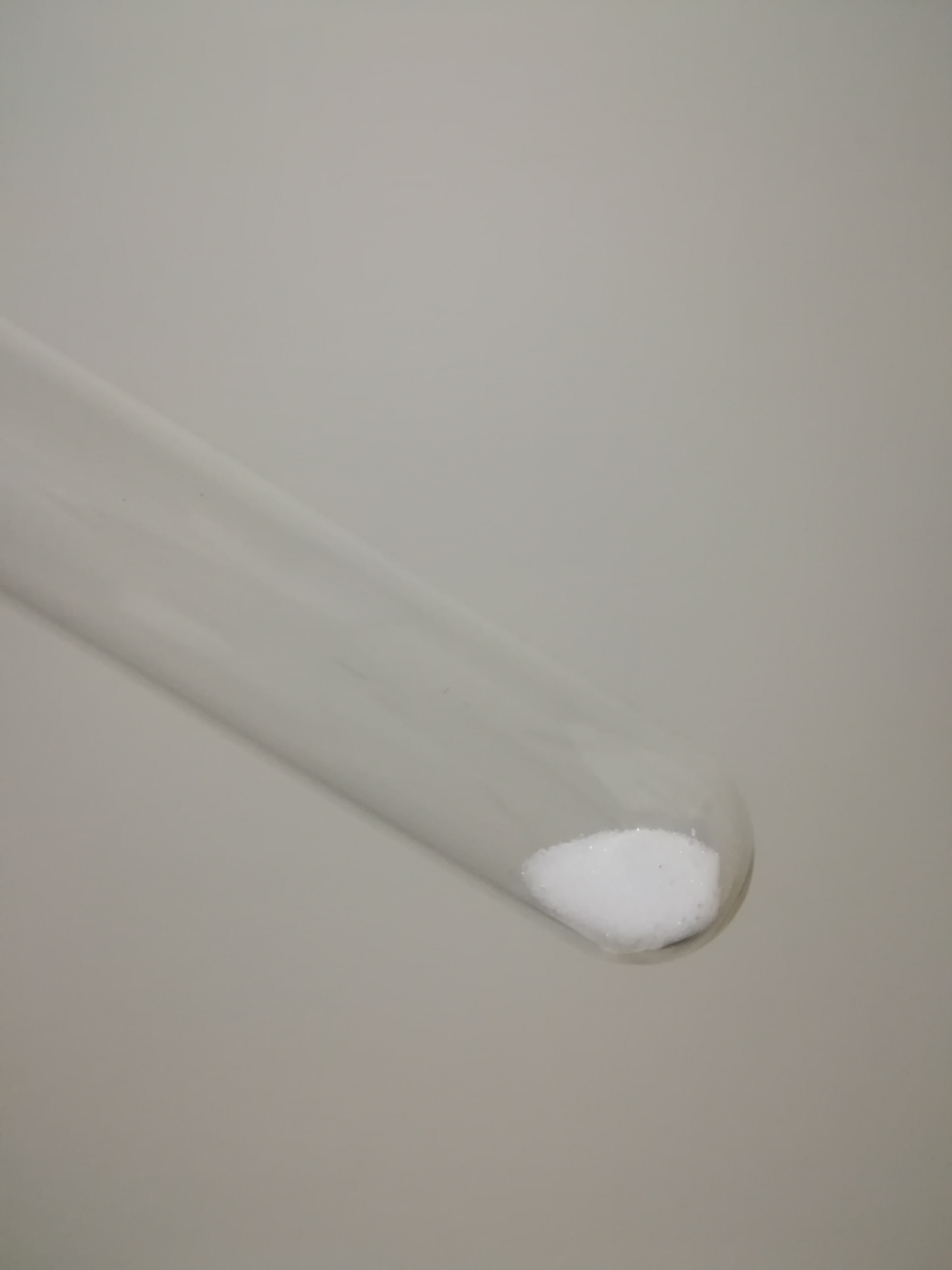 氟锆酸钾，K2ZrF6，CP(98%)。